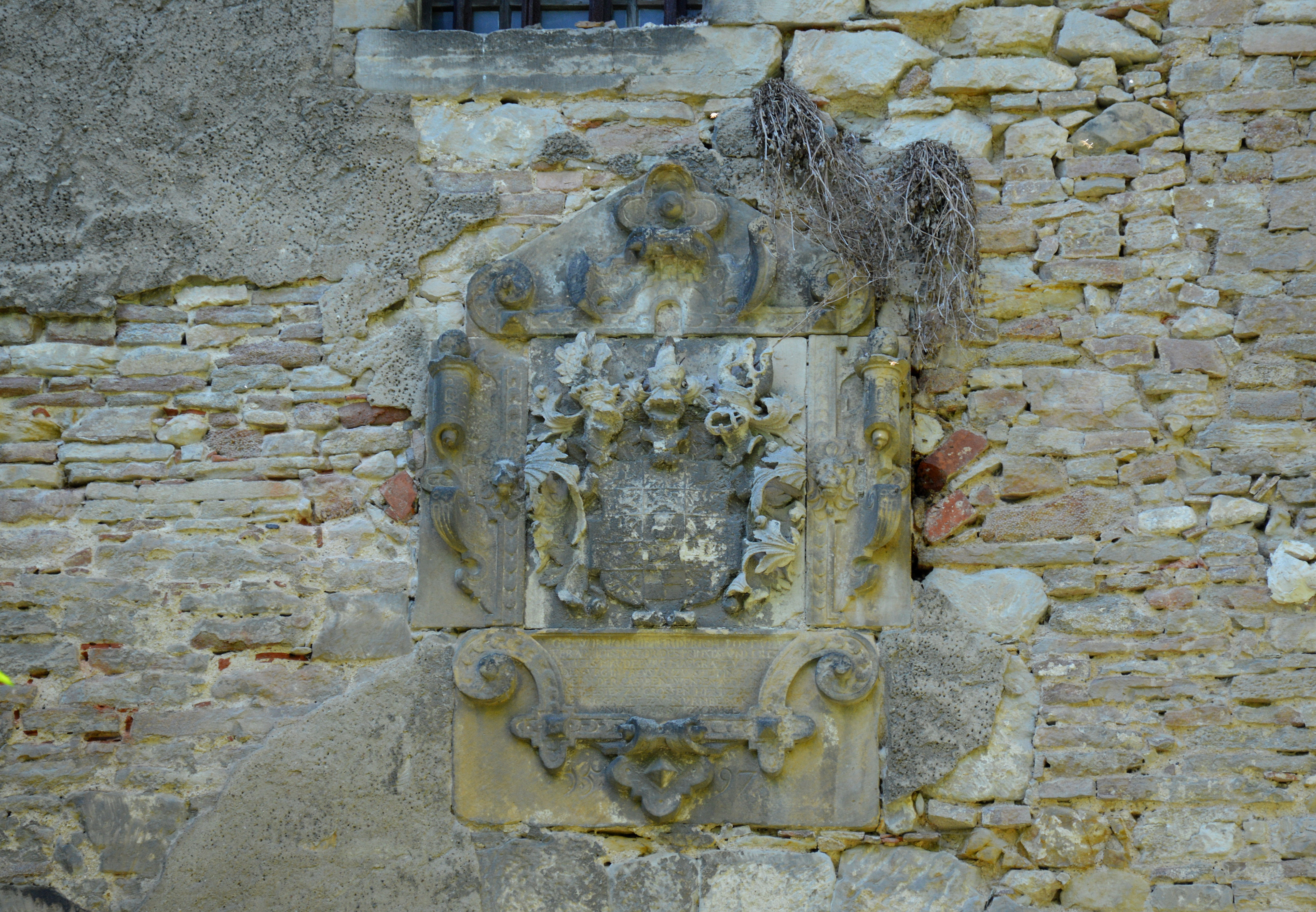 Auf dem Amt in Hötensleben, Wappen über dem Tor